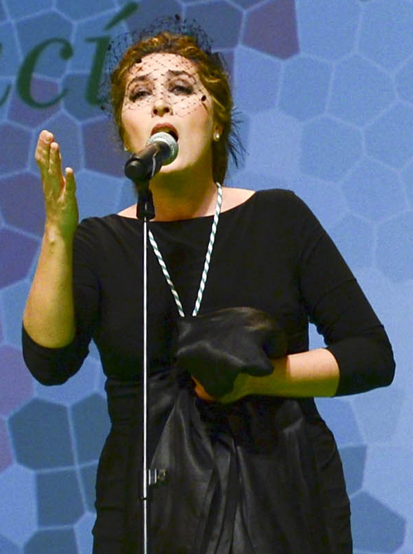 Estrella Morente cantant l'himne d'Andalusia.